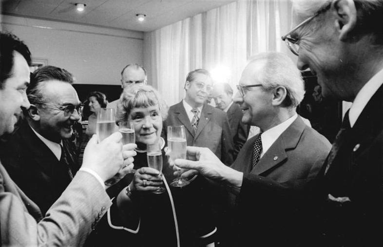 Berlin, Eröffnung Otto-Nagel-Haus, Honecker ADN-ZB Mittelstädt 12.7.73 Berlin: Nagel-Haus- Das neugestaltete Otto-Nagel-Haus am Berliner Märkischen Ufer ist am 12.7.73, dem 6. Todestag des bedeutenden proletarischen Malers, feierlich eröffnet worden. Zu den Gästen der Feier gehörten Erich Honecker (2.v.r.), die Witwe des Künstlers, Walentina Nagel (Mitte), Prof. Hans Pischner (2.v.l.) und Roland Bauer (l.). Das Nagel-Haus wird als Stätte des Gedenkens, der Forschungsarbeit und der Begegnung zwischen Werktätigen und Künstlern dienen. Abgebildete Personen: Nagel, Otto Prof.: Maler, Präsident der Akademie der Künste (AdK), Nationalpreisträger, Vaterländischer Verdienstorden (VVO) in Gold, DDR (GND 118586300) Honecker, Erich: Staatsratsvorsitzender, Generalsekretär des ZK der SED, DDR (GND 118553399)